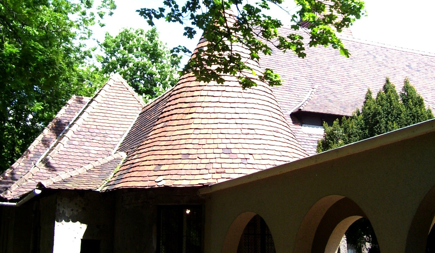 Városmajori kistemplom, Budapest XII. (tervezte Árkay Aladár, 1925)